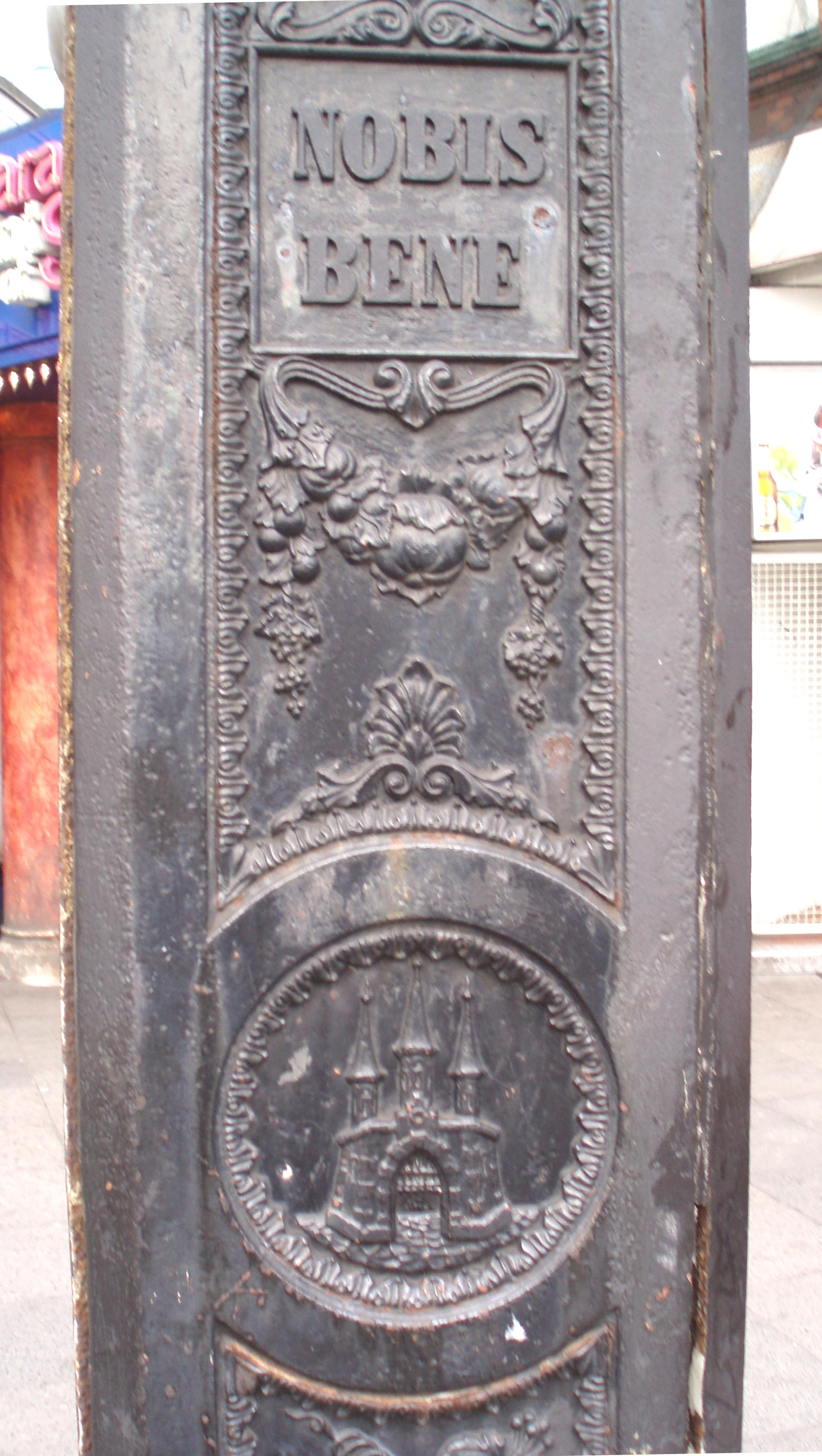 NOBIS BENE (nemini male) (= Uns wohl, niemand übel) und Wappen von Altona auf der Südseite des Nobistor-Pfeilers/Kandelabers Reeperbahn 170, Hamburg